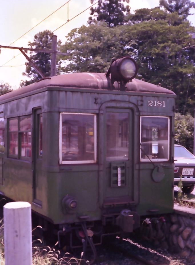 名鉄ク2181号、黒野駅にて撮影。